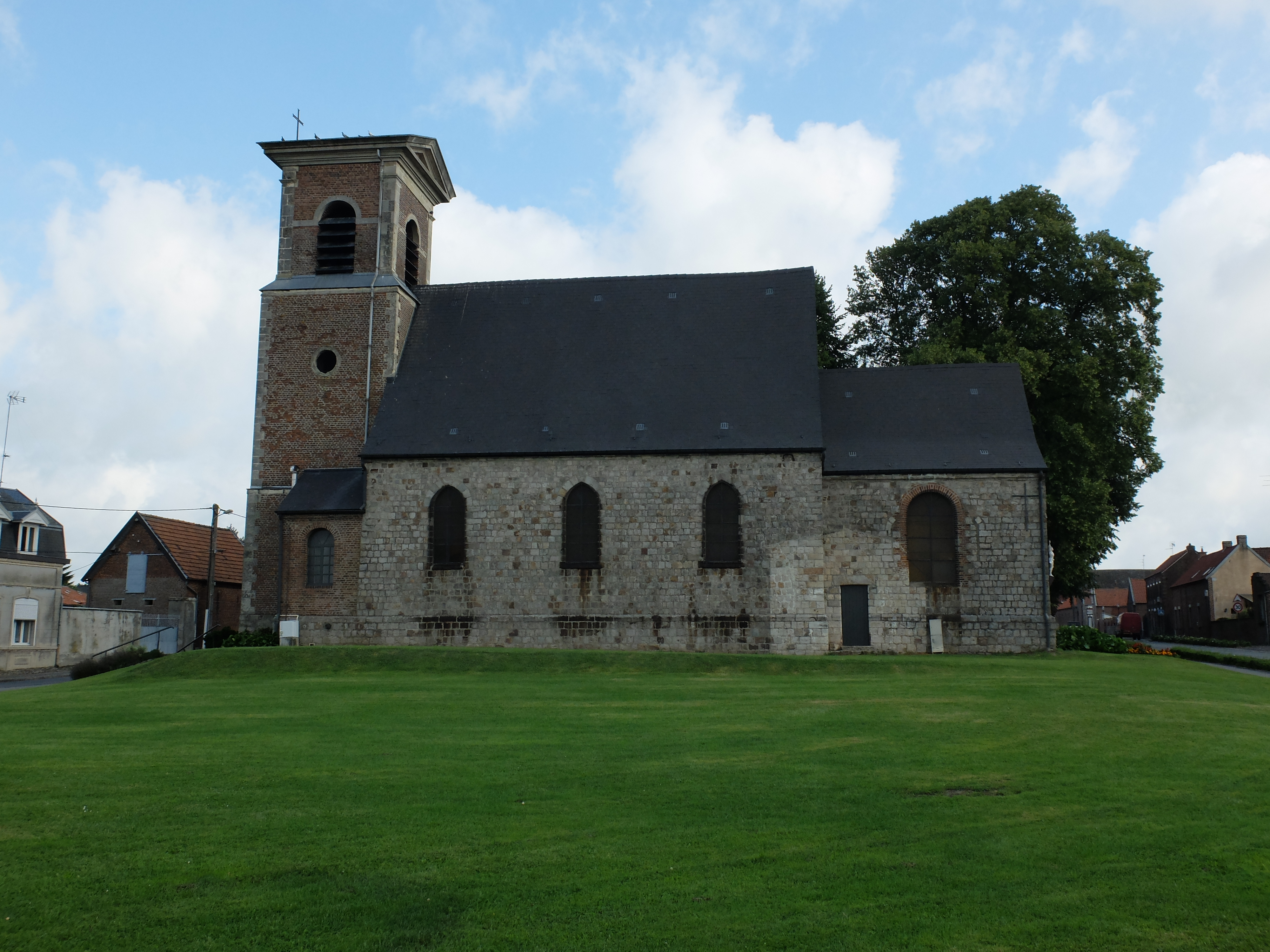 Vue de l'église Saint-Landelain de Quérénaing.